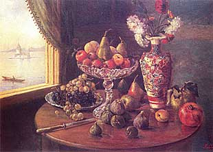 Still life